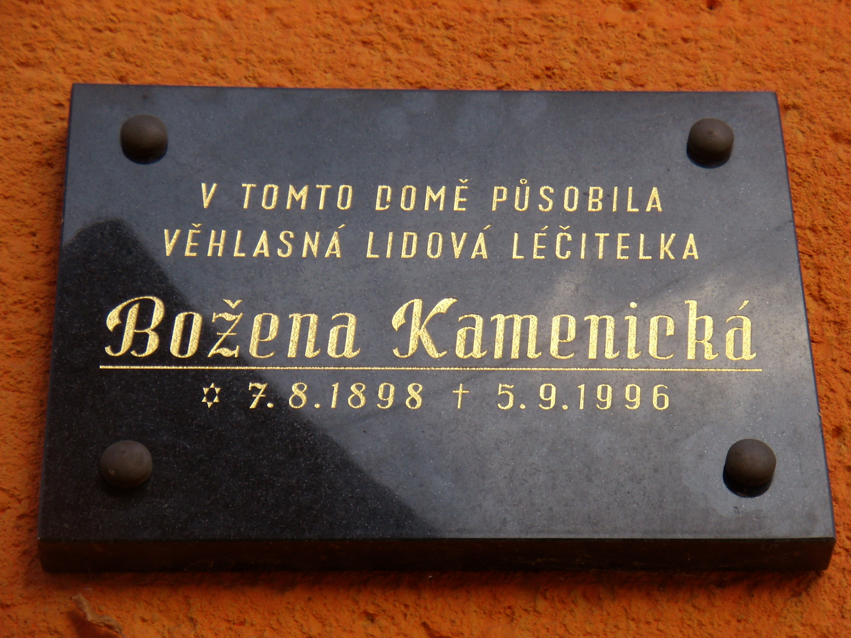 Radnice - deska Boženy Kamenické